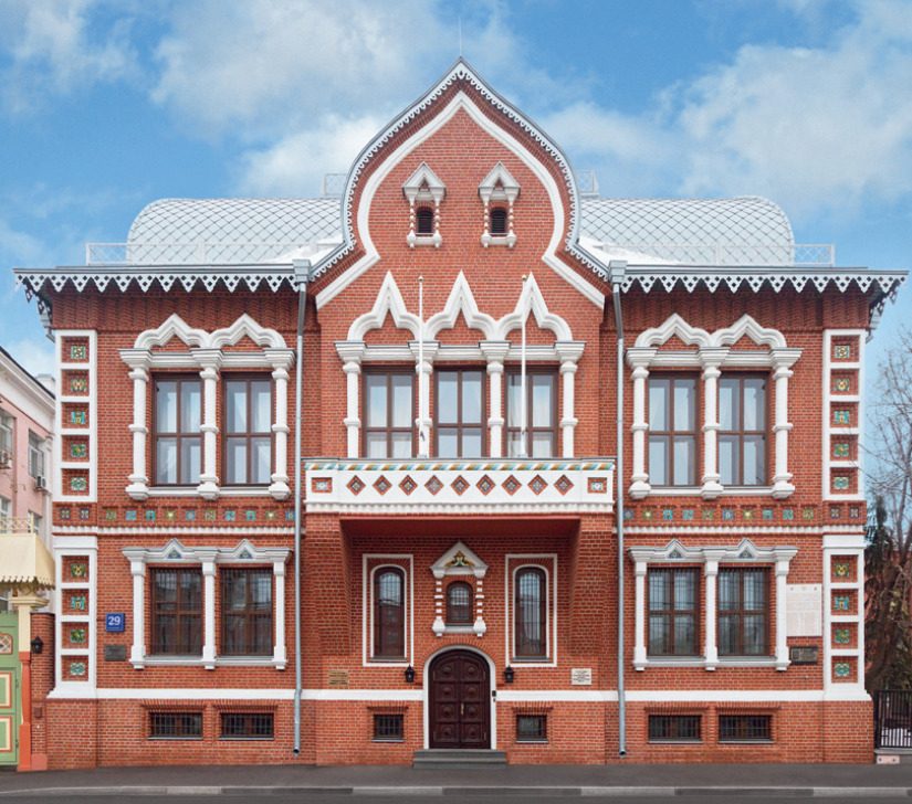 Фасад особняка Цветковой после реставрации 2016 года